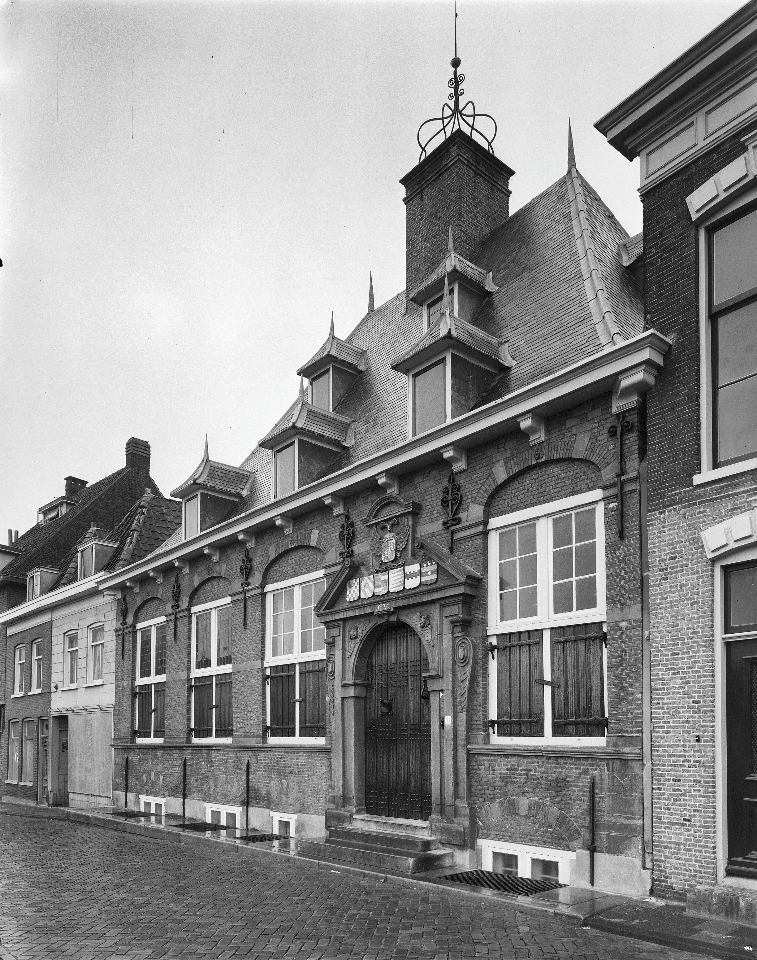 Gemeenlandshuis van Delfland: voorgevel